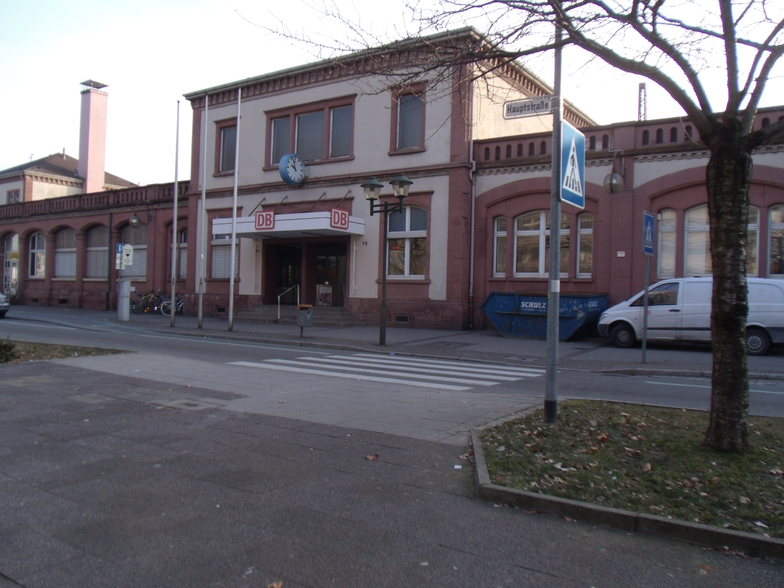 Offenburg Hauptbahnhof von Friedrich Eisenlohr, Hauptstraße